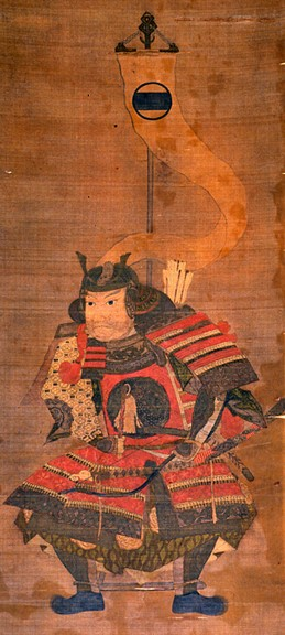 横瀬泰繁の肖像。